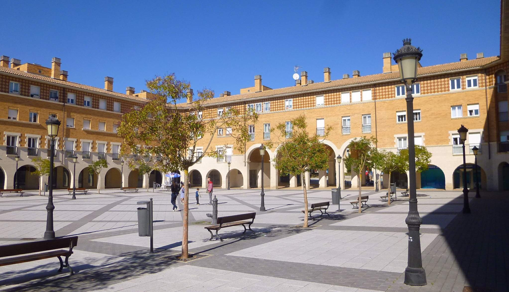 Orcoyen - Plaza Iturgain